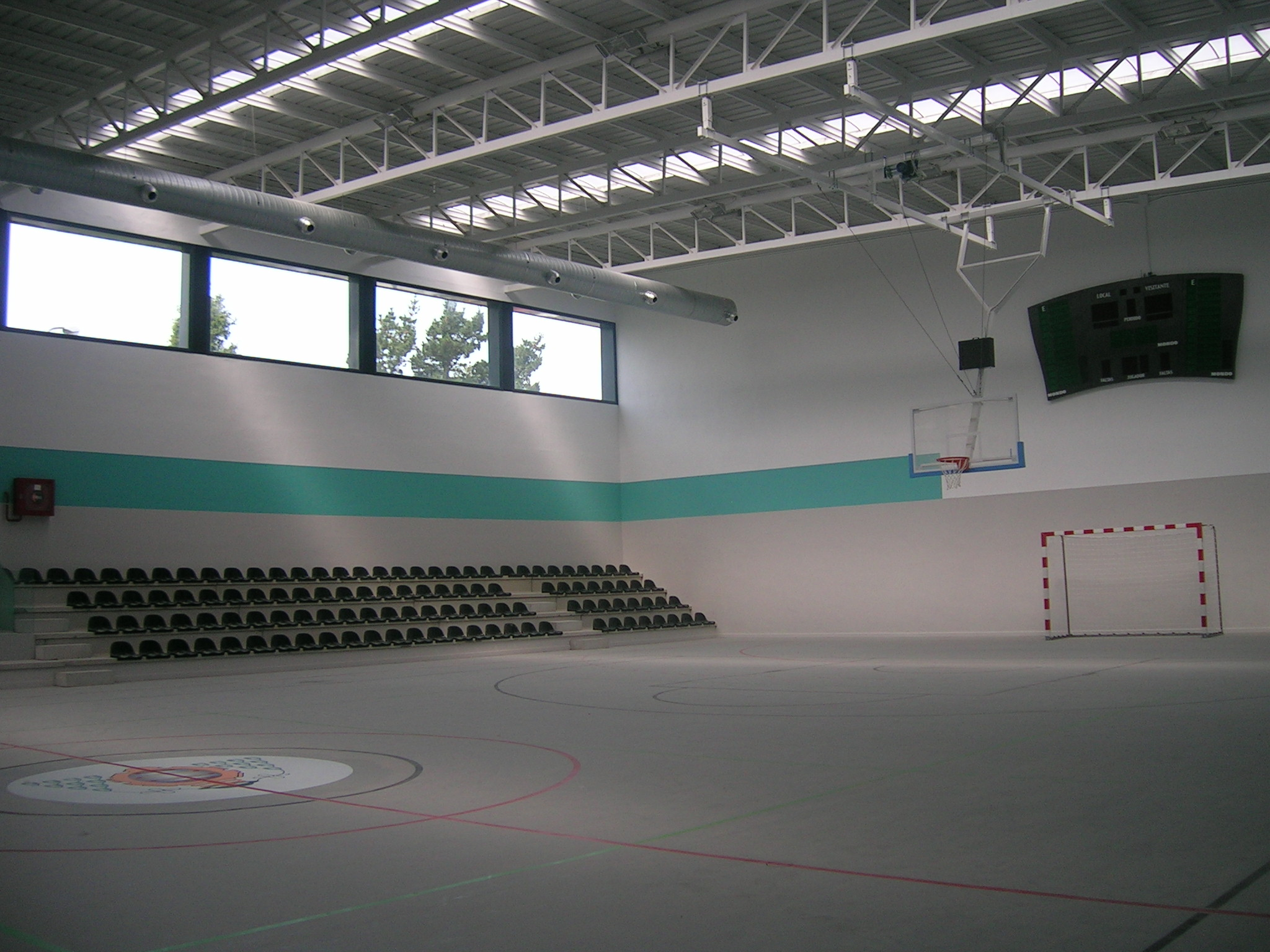 El interior del pabellón en mayo del año 2012 durante las reformas.